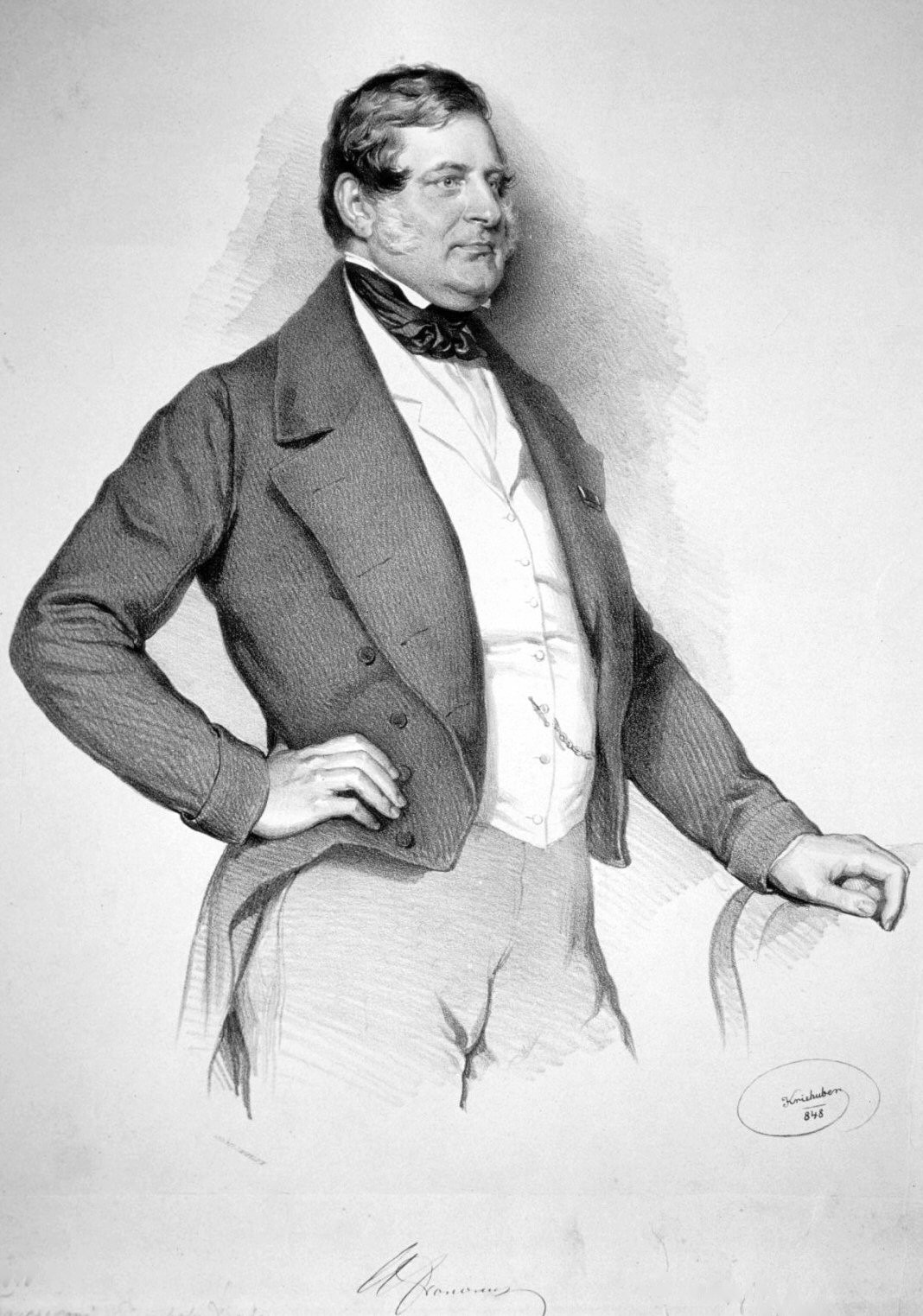 Hermenegild von Francesconi, Lithographie von Josef Kriehuber, 1848